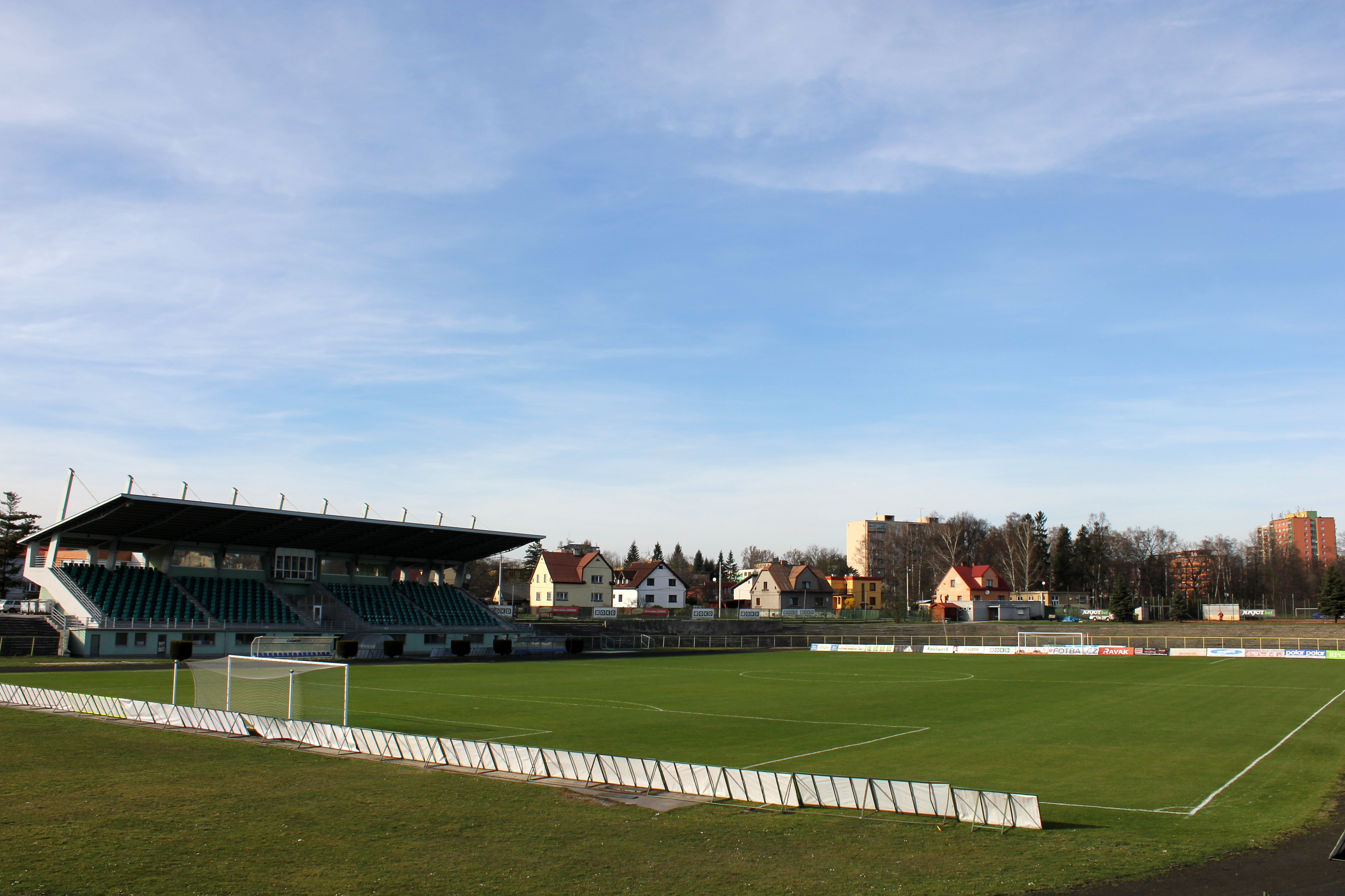 Městský stadion v Karviné-Ráji.